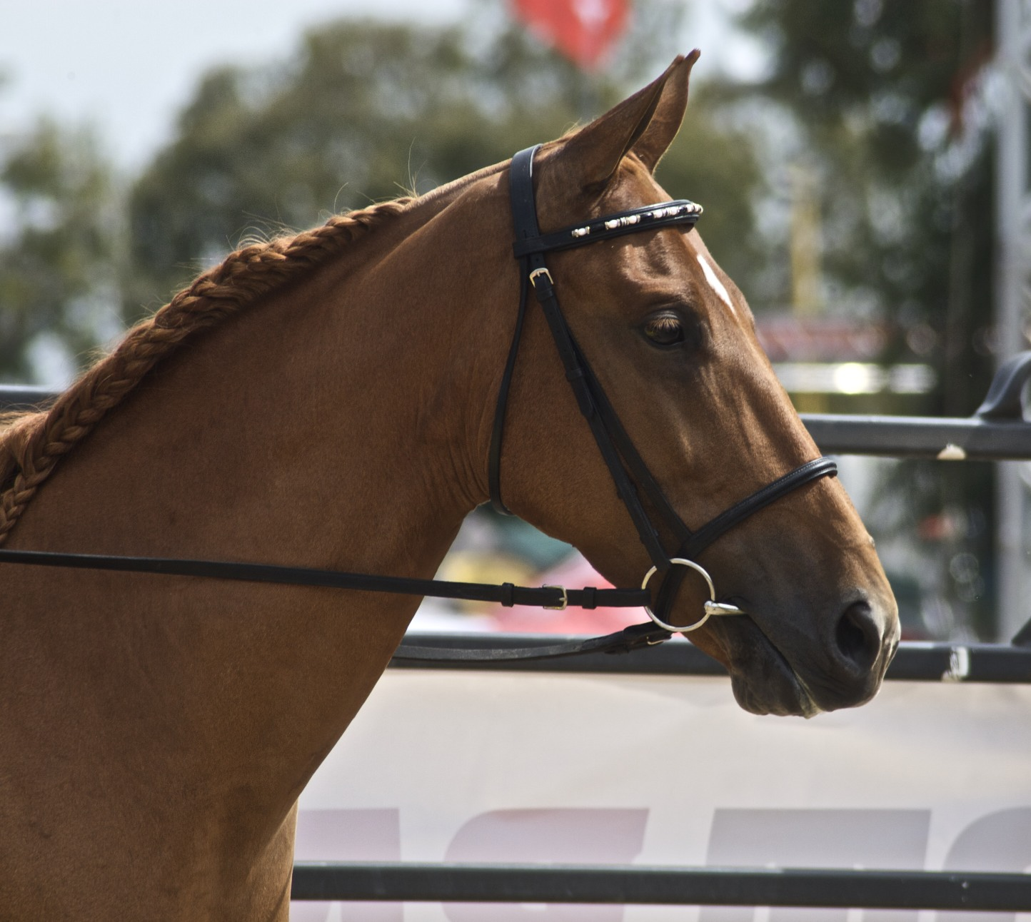 Tennessee Walking Horse